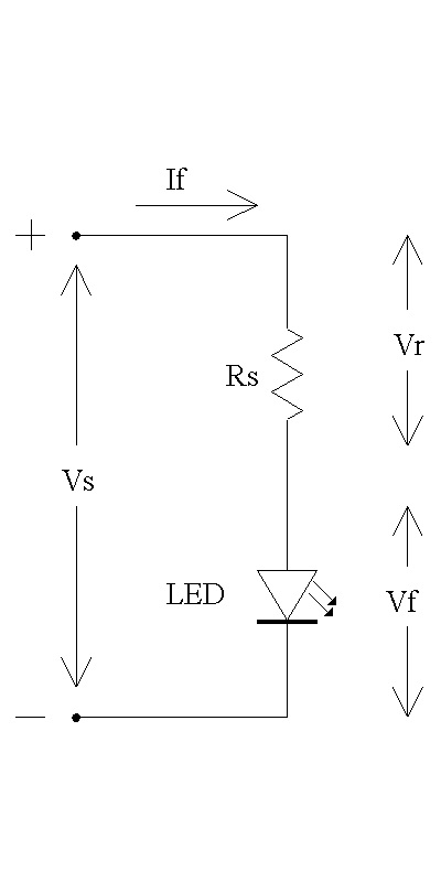 Grandezze in gioco nel calcolo di una resistenza per l'alimentazione di un LED.